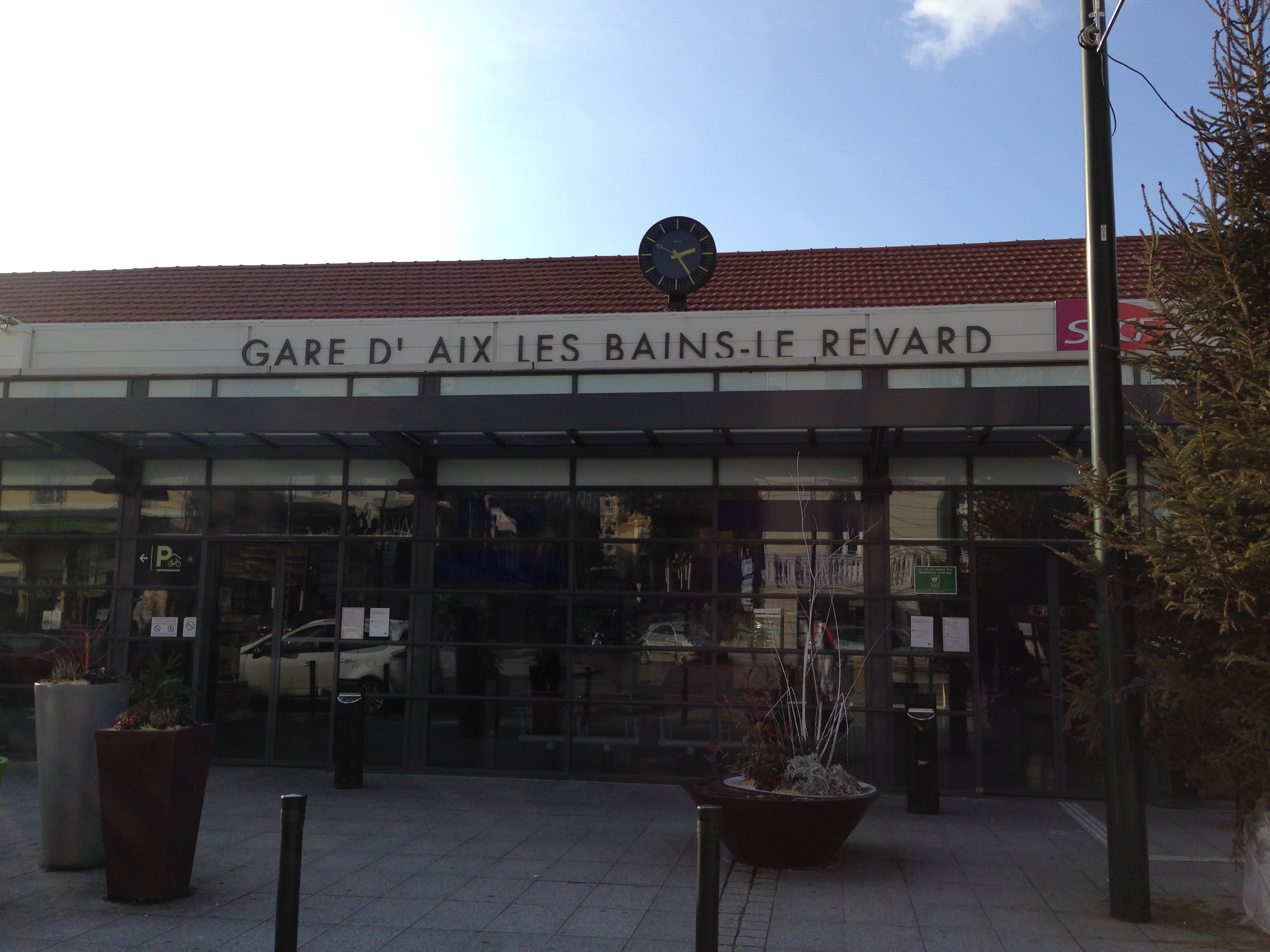 Gare d'Aix-les-Bains-Le Revard-2014